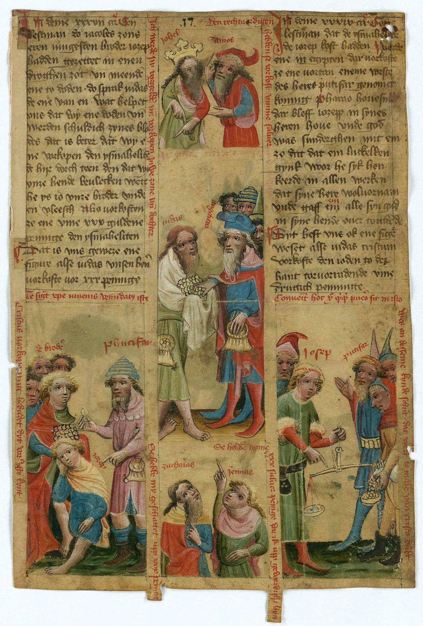 Enkeltblad fra en Biblia Pauperum med Judaskysset i det sentrale billedfeltet på den ene siden og Judas og sølvpengene på den andre. Teksten er skrevet på nedertysk, med rubrikker i rimede hexametre på latin. Fragmentet ble funnet hos en bonde på Fyn rundt 1700. I 1783 kom det til Det Kongelige Bibliotek blant papirer etter historikeren og bibliotekaren Hans Gram (1685-1748).